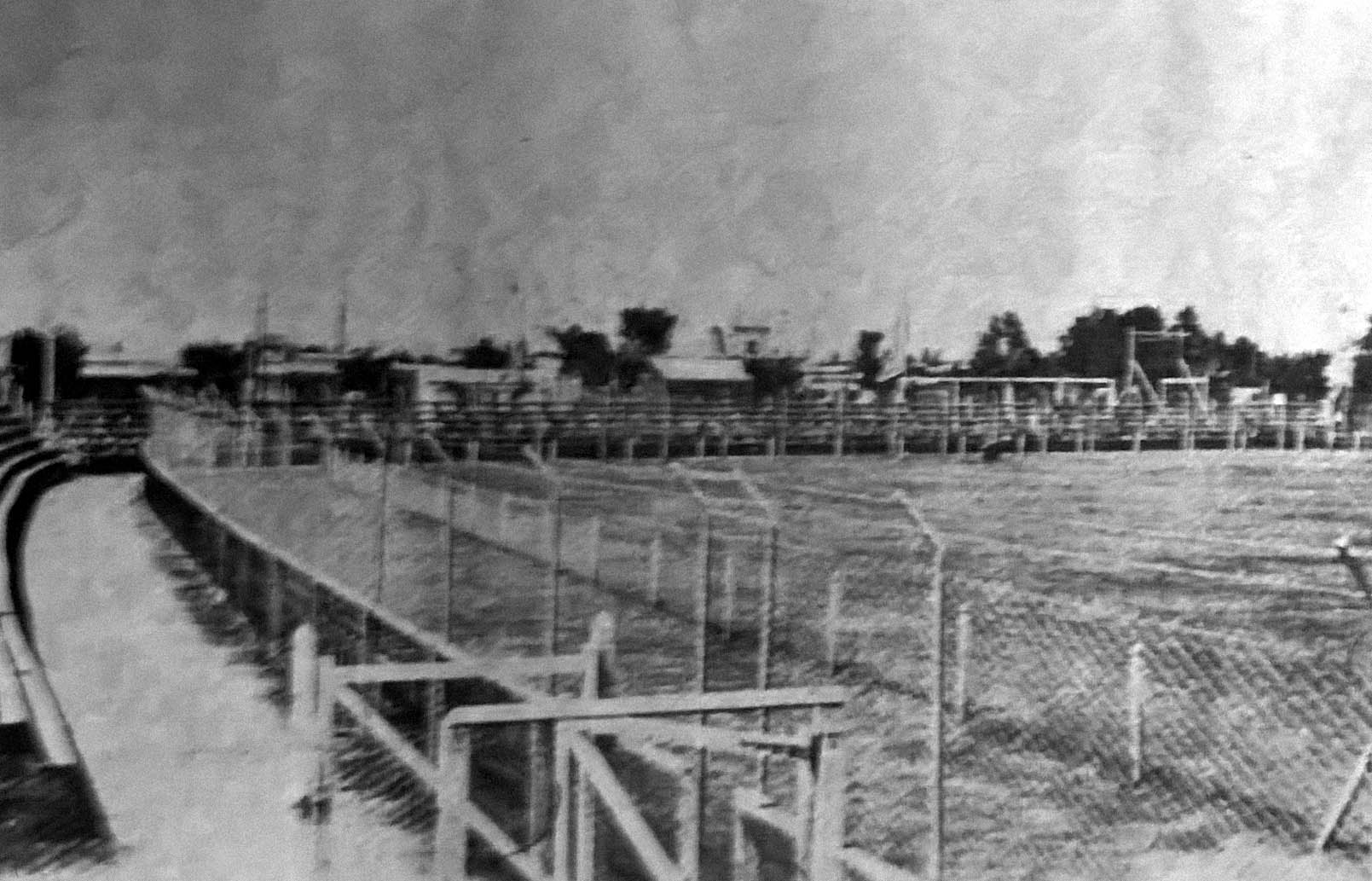 Imagen del recientemente inaugurado estadio del Club Atlético Rosario Central en Barrio Arroyito en 1926.